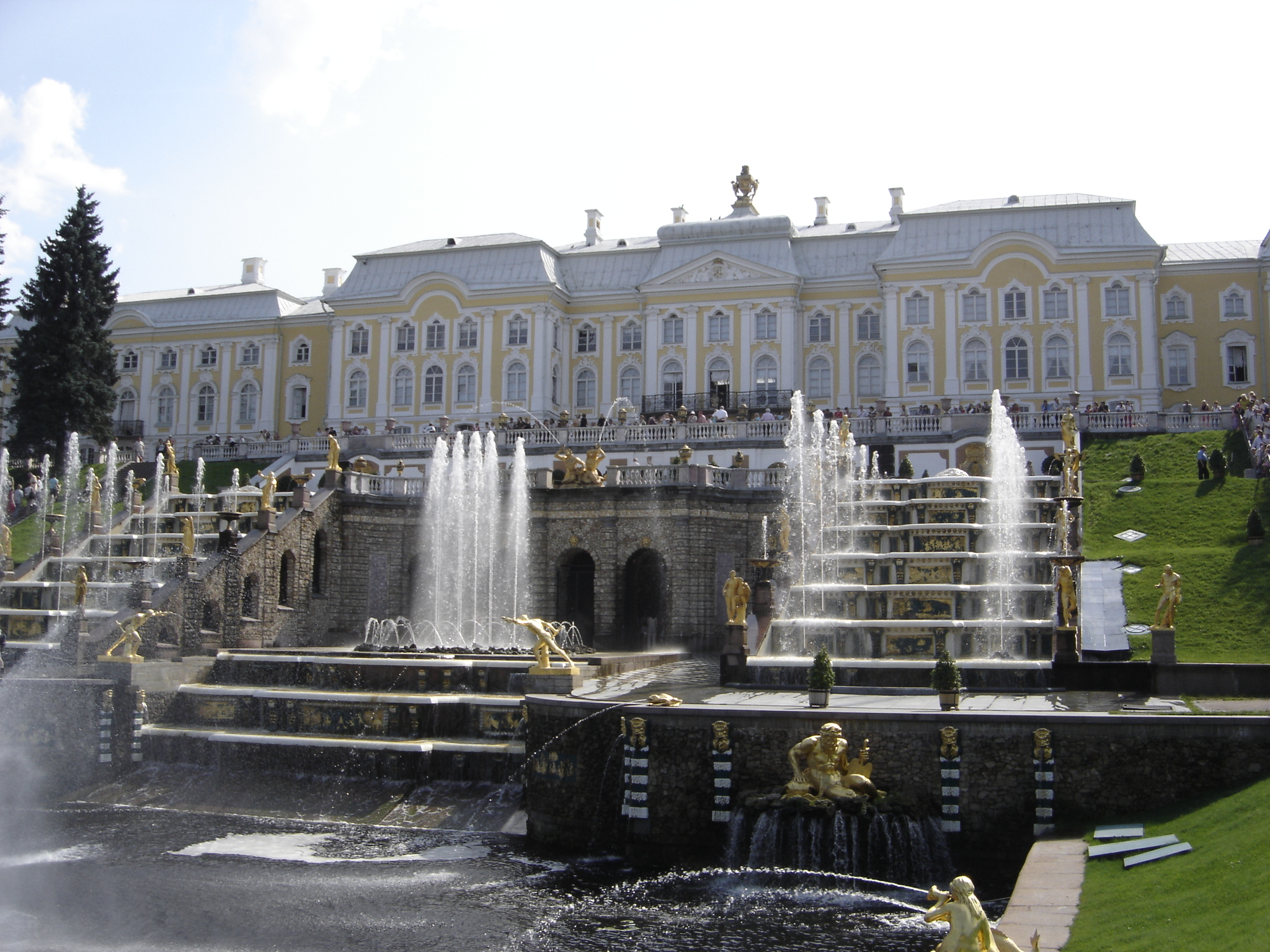 Palais de Peterhof (Petrodvorets)